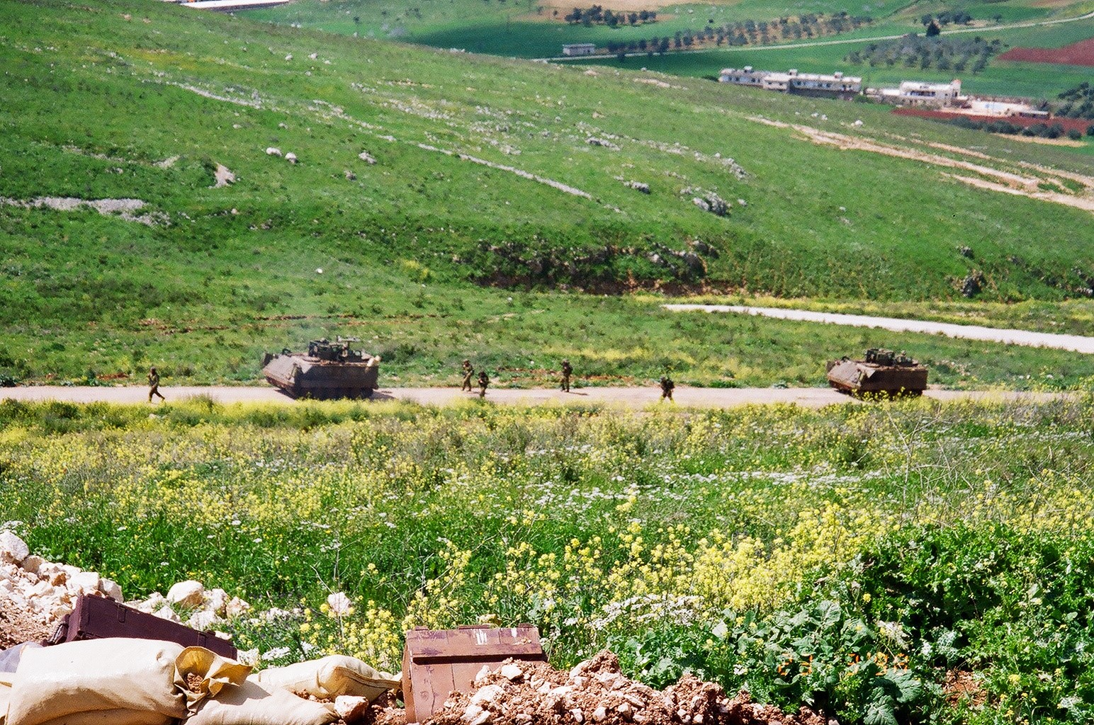 פתיחת ציר לעבר מוצב שרייפה התחתון ברצועת הביטחון בלבנון התמונה צולמה על ידי שחר ב 1997